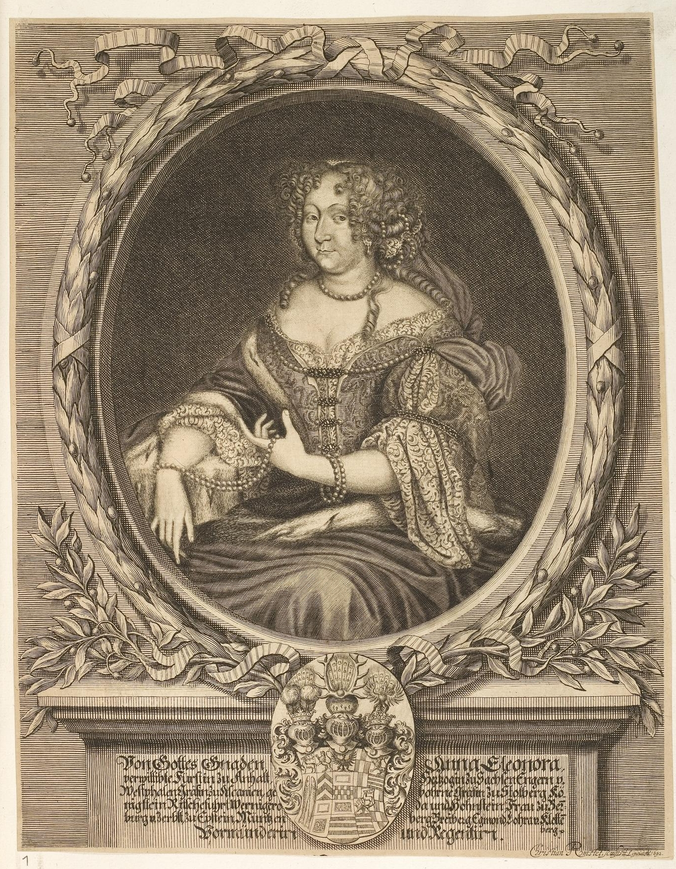 Grafik aus dem Klebeband Nr. 1 der Fürstlich Waldeckschen Hofbibliothek Arolsen Motiv: Anna Eleonore zu Stolberg-Wernigerode, Ehefrau von Emanuel von Anhalt-Köthen Fürst von Anhalt-Plötzkau